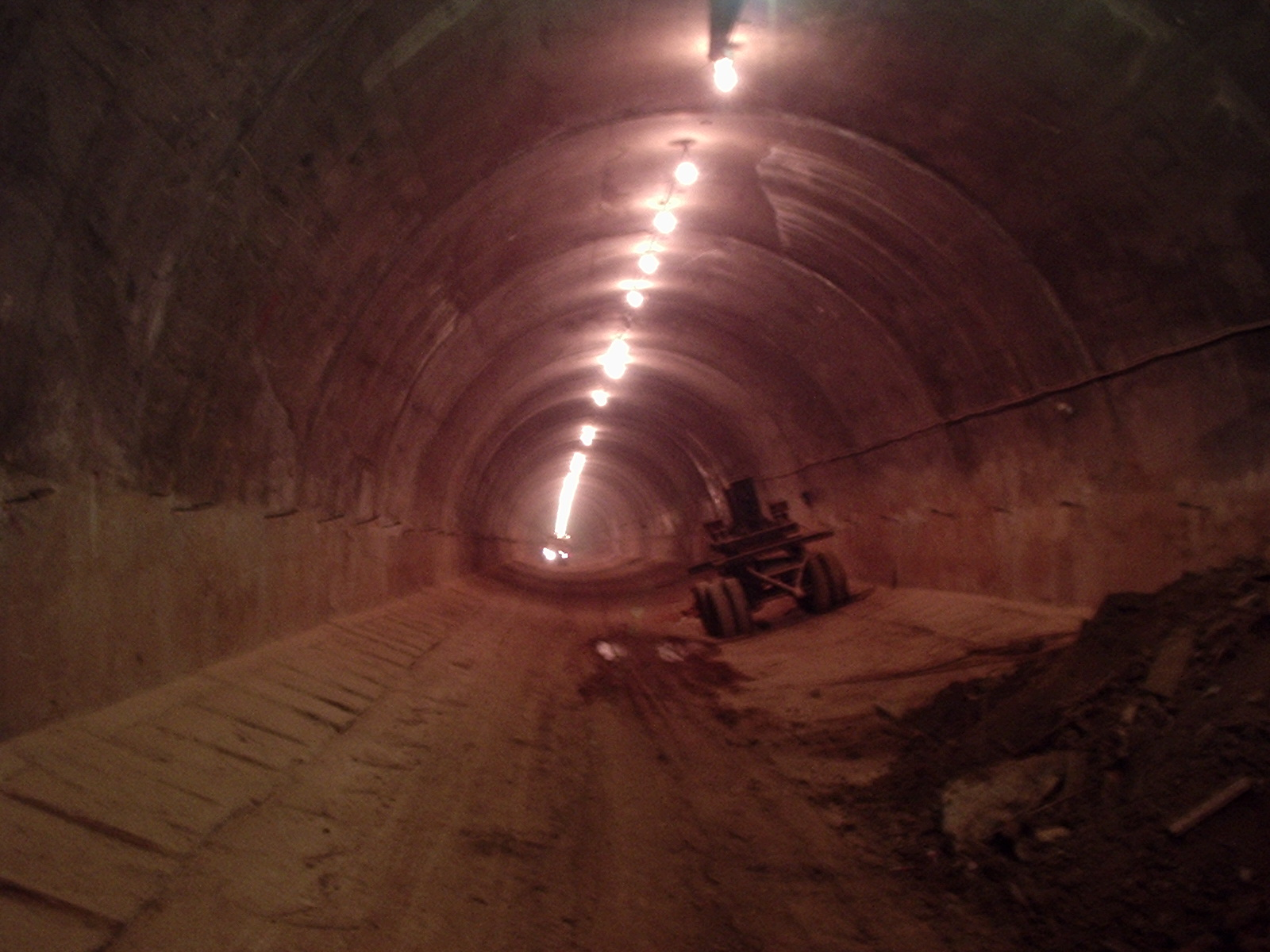 Tunel perteneciente a la extension de la Linea A de la red de subterraneos de la ciudad de Buenos Aires, foto tomada a metros de la futura estacion Puan. [sic]